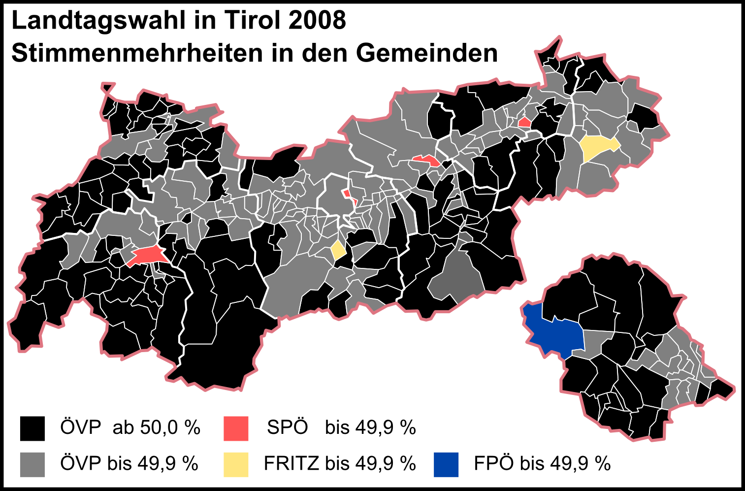 Erstellt unter Nutzung von Image:Gemeinden Tirol.svg